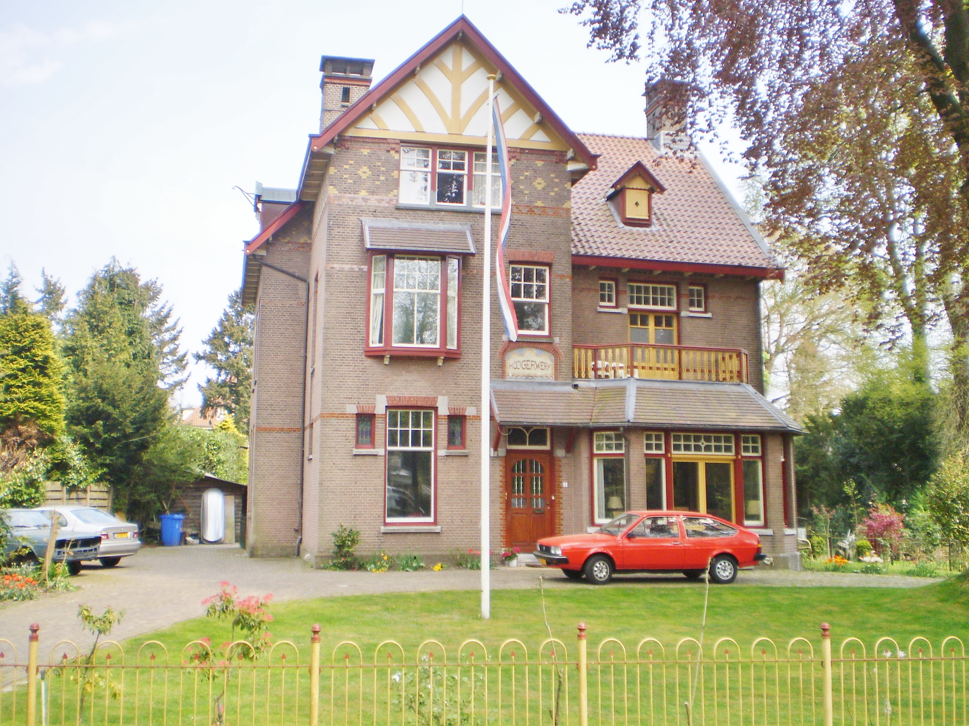 Hoog Baarn